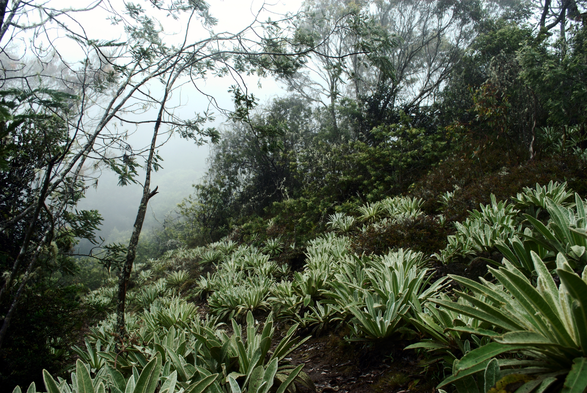 Sendereo de páramo rodeado de frailejones